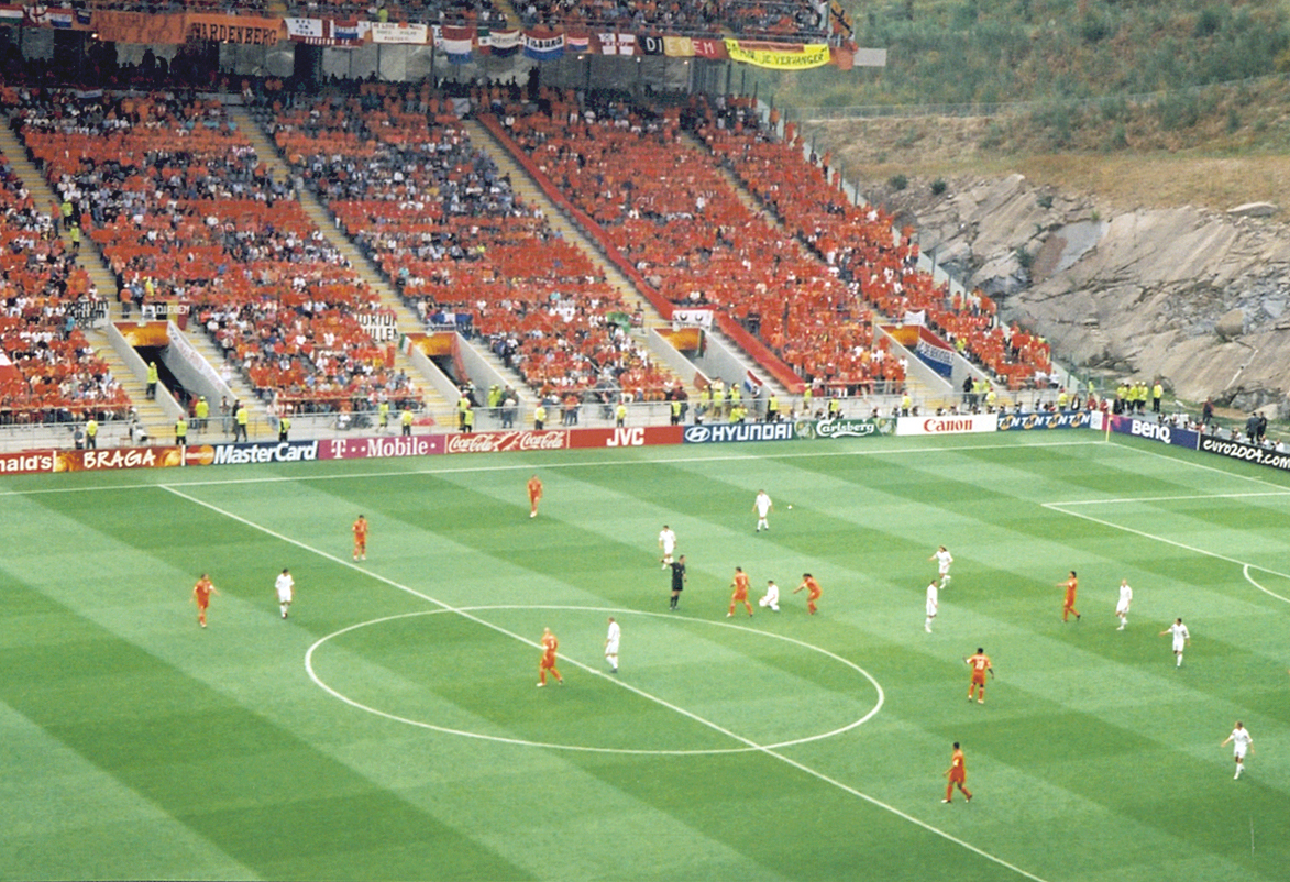 Nederlands vs. Latvija, 23.6.2004.